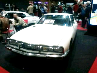 Première SM de série